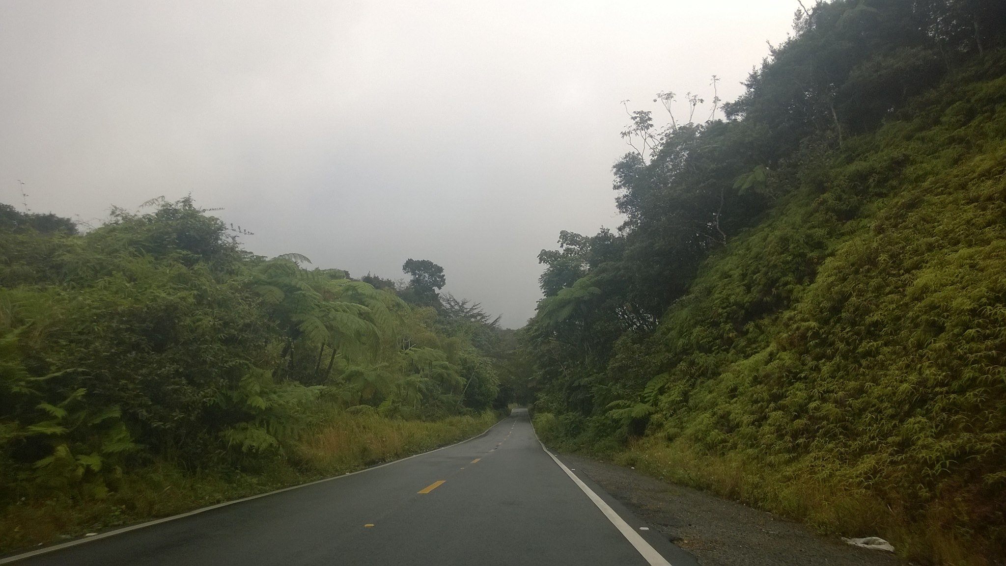 Carretera PR-184, Patillas, Puerto Rico (2014)